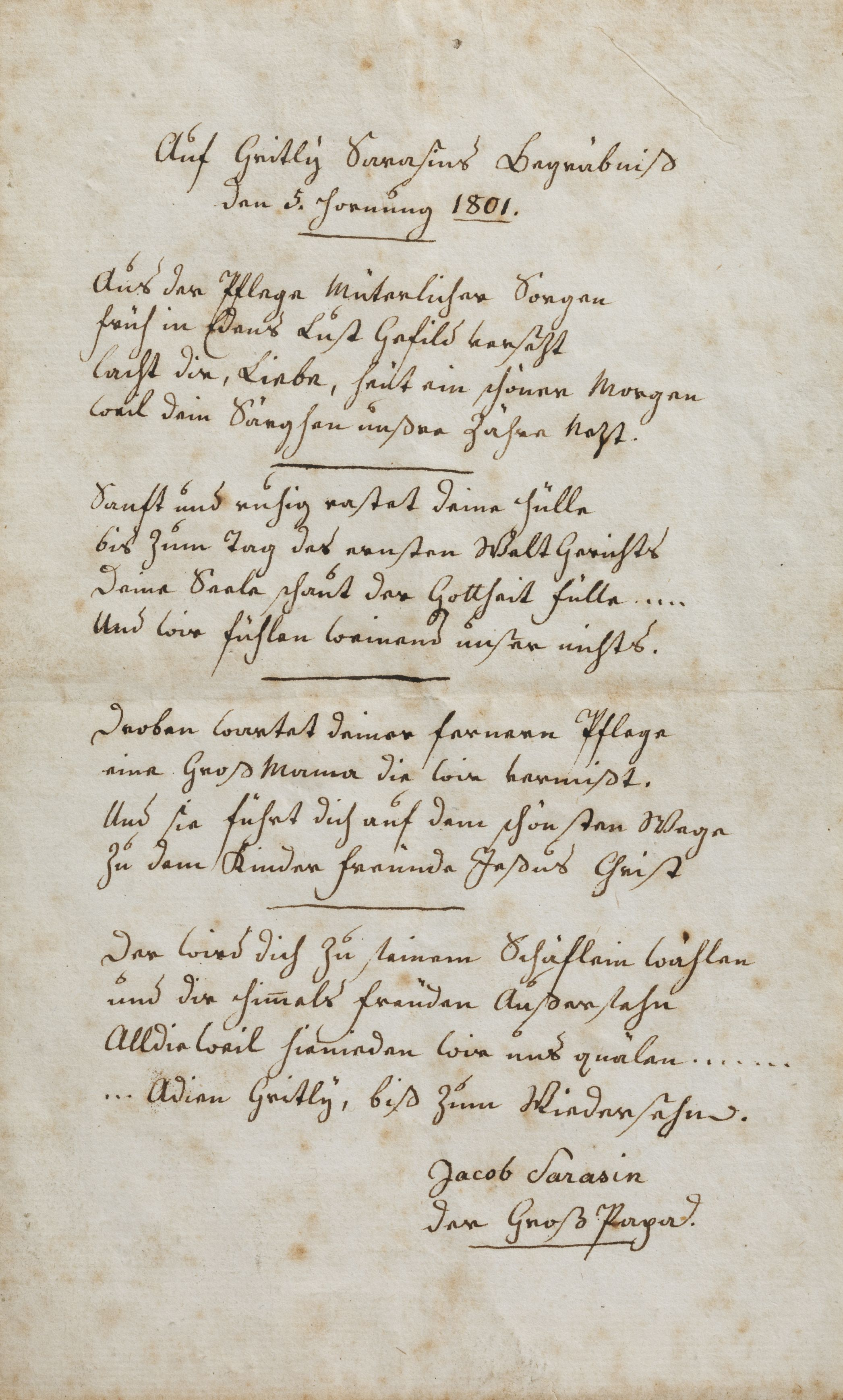 Handschriftliches Gedicht auf das Begräbnis seiner Enkelin Gritly Sarasin. 20 x 11,8 cm. Schweiz, 1801.